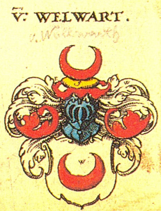 Ritterschaft und Adel in Franken von Welwart